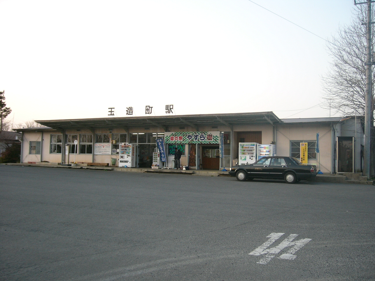 Tamatsukurimachi Station